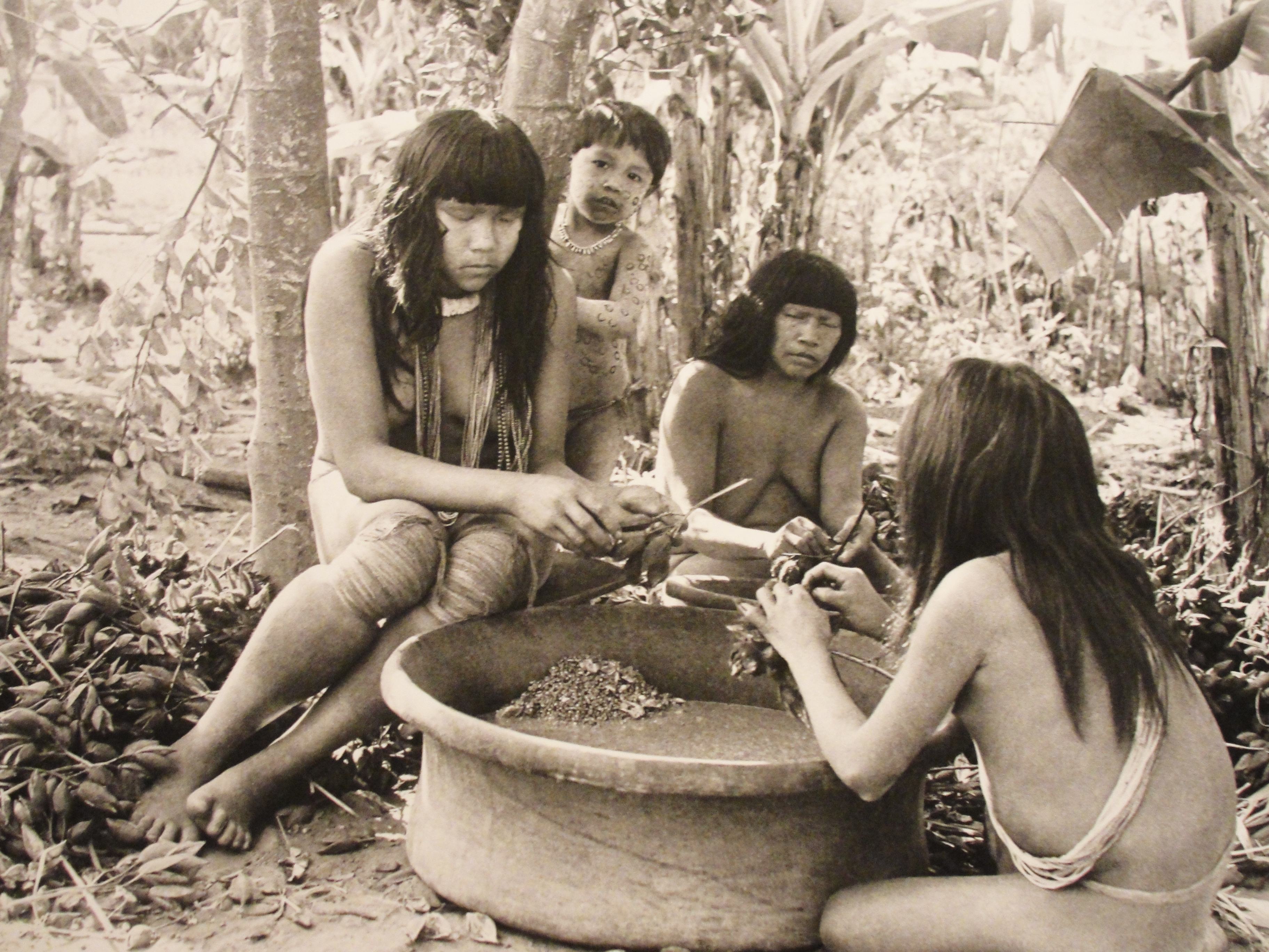 Mulheres da aldeia xinguana Kuikuro cuidando do preparo dos aliementos